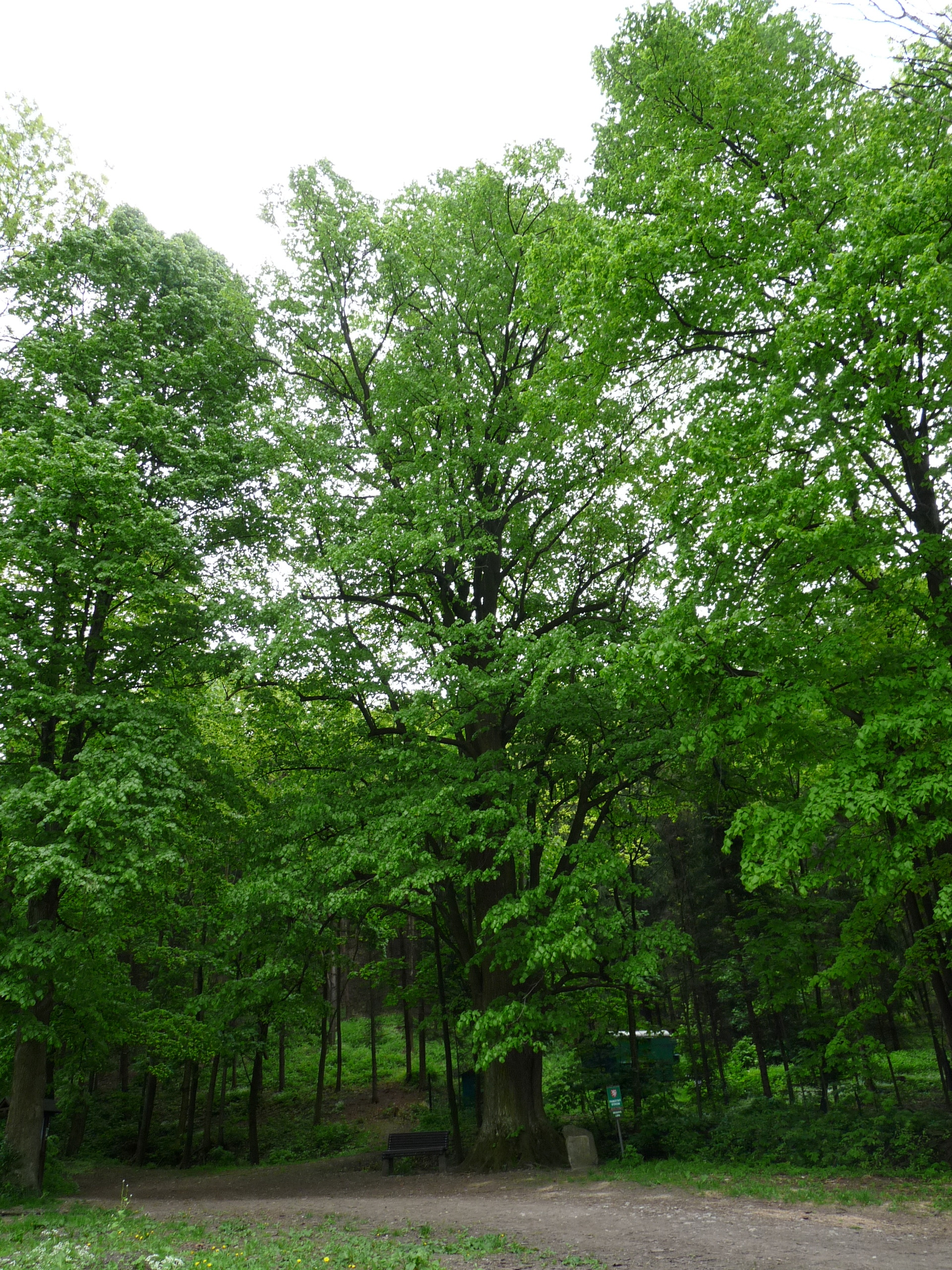 Husova lípa v Kopřivnici